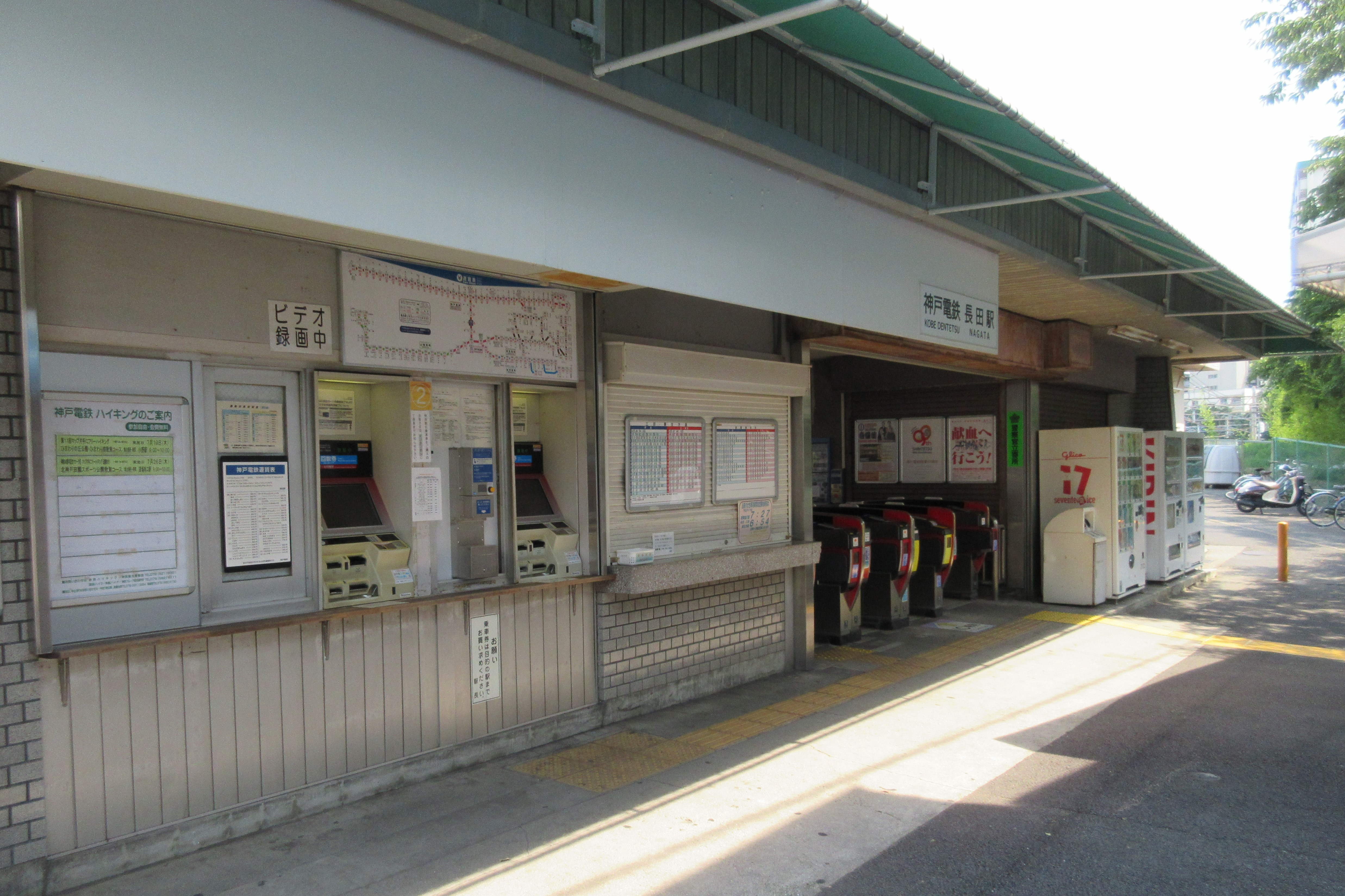 神戸電鉄長田駅